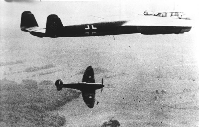 Im Luftkampf mit englischen Jägern Es ist Kriegsberichtern gelungen, während eines Luftkampfes Aufnahmen einzelner Kampfphasen herzustellen. Eine hervorragende Leistung, die Kaltblütigkeit und Unerschrockenheit verlangt. Unentwegt zieht die DO 17 ihre Bahn, während die Spitfire nach ergebnislosen Angriff nach unten abkurvt. 10.12.40 PK/K.. F 8927 Wb KG., PK Speer-Weltbild "FR. OKW" (Text von Bild 183-F08927)